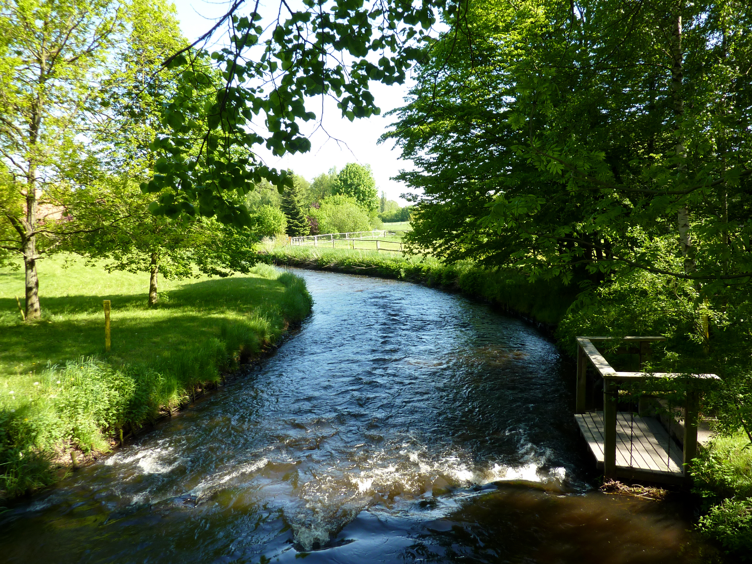 Der Fluß Gerdau am westlichen Ortsrand von Bohlsen, Teil der Gemeinde Gerdau sowie der Samtgemeinde Suderburg.